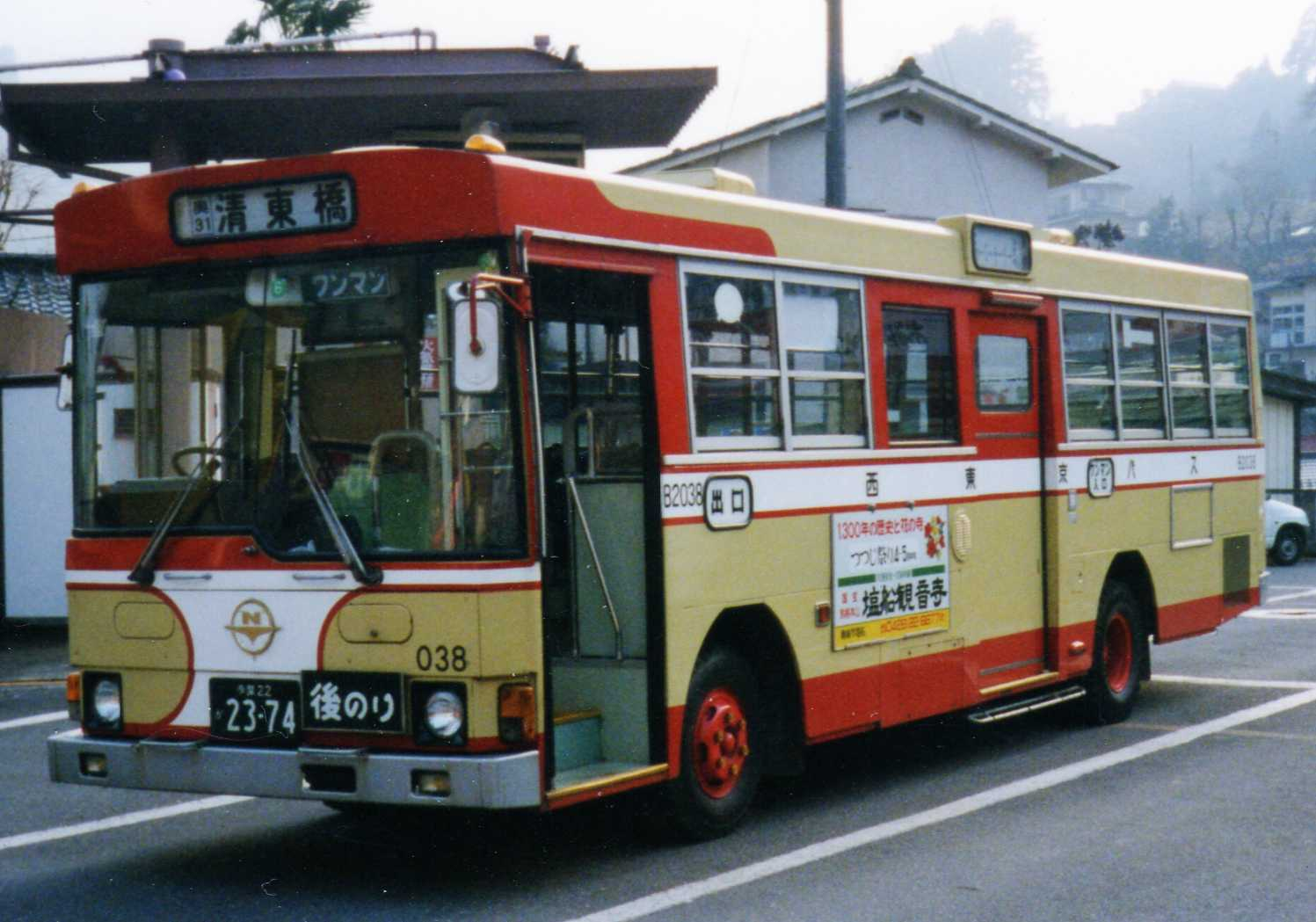 Nishi Tokyo Bus B2038 Hino K-RJ172AA at Okutama Sta.